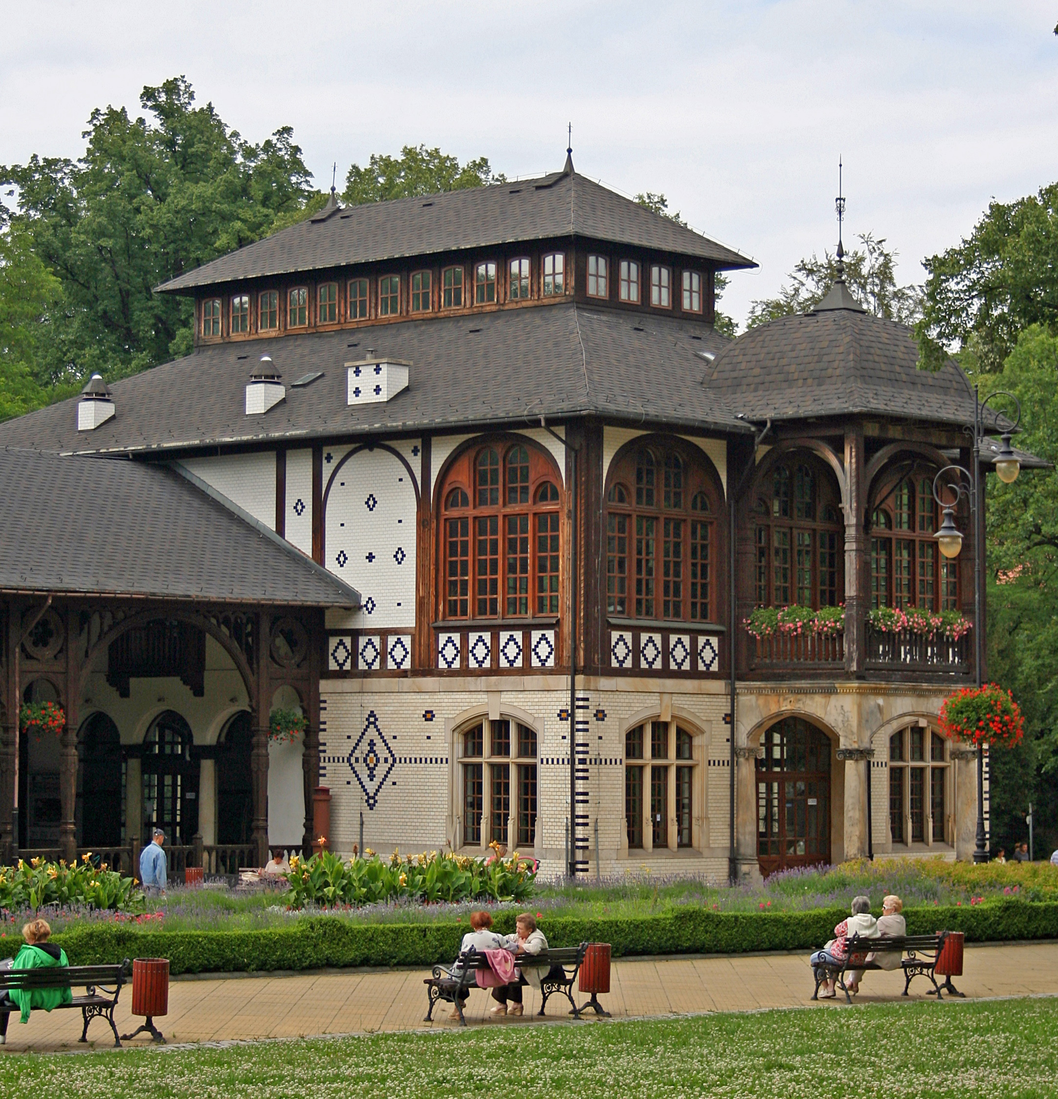 Pijalnia wód mineralnych w Szczawnie-Zdroju